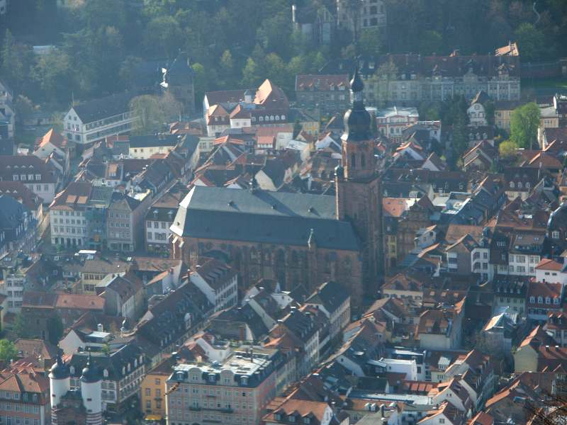 Heidelberger Heiliggeistkirche vom Heiligenberg aus (Aussichtsturm beim ehemaligen Stephanskloster) Bild:Heidelberg_Heiliggeistkirche_Gesamtansicht.jpg (Weiteres kleineres Bild der Kirche vom Philosophenweg aus gesehen. Der Fluss am unteren Bildrand ist der Neckar)